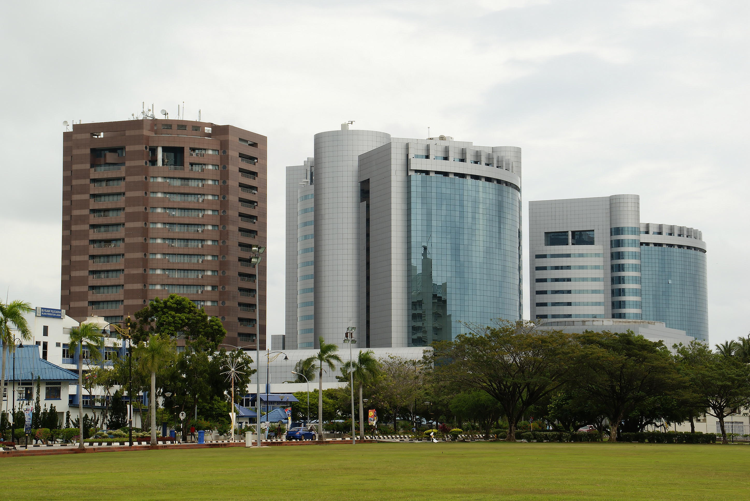 Labuan Financial Park.(Bandar Labuan, Labuan, Malaysia)